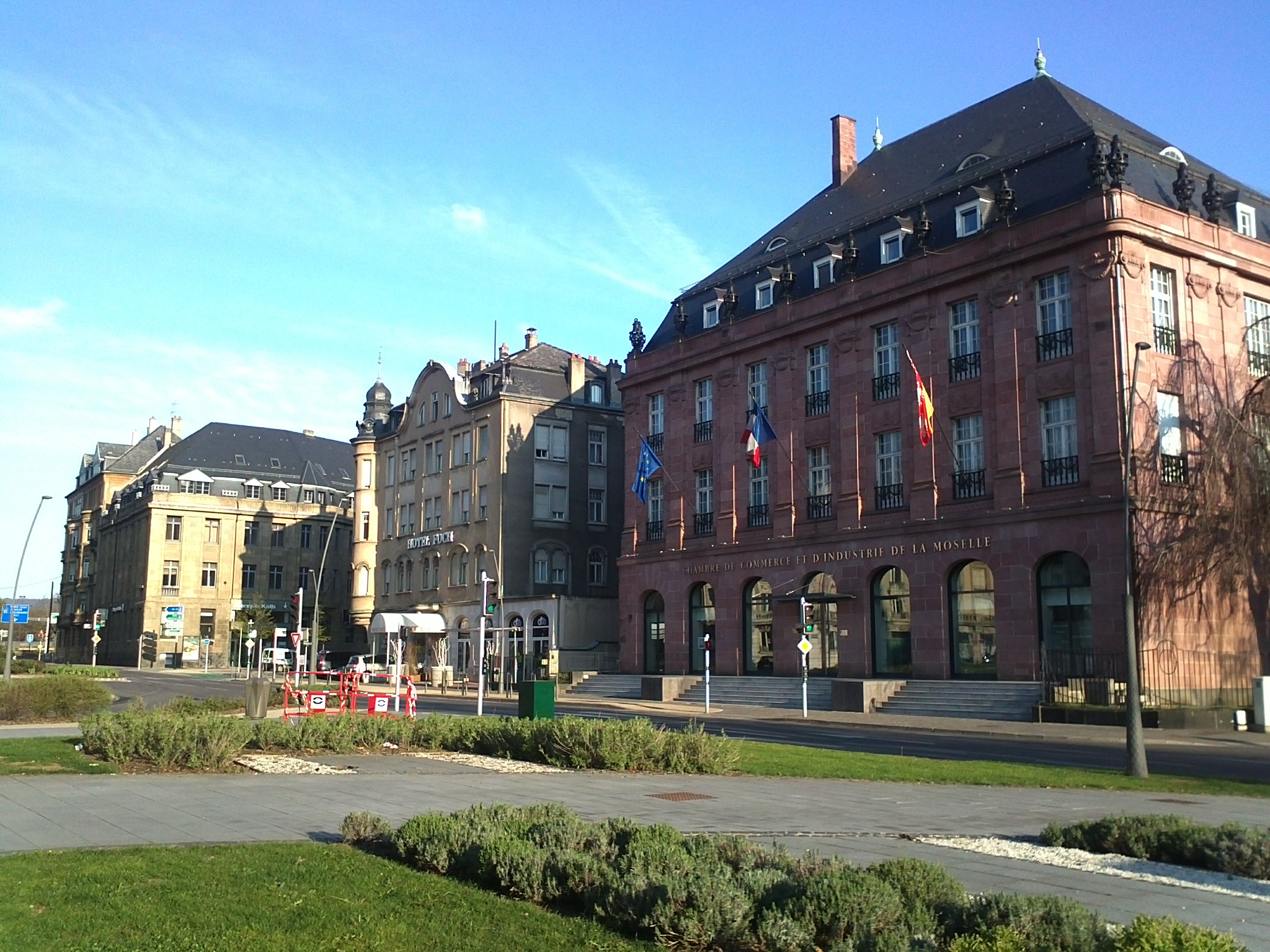 bâtiment du CCI Moselle à Metz